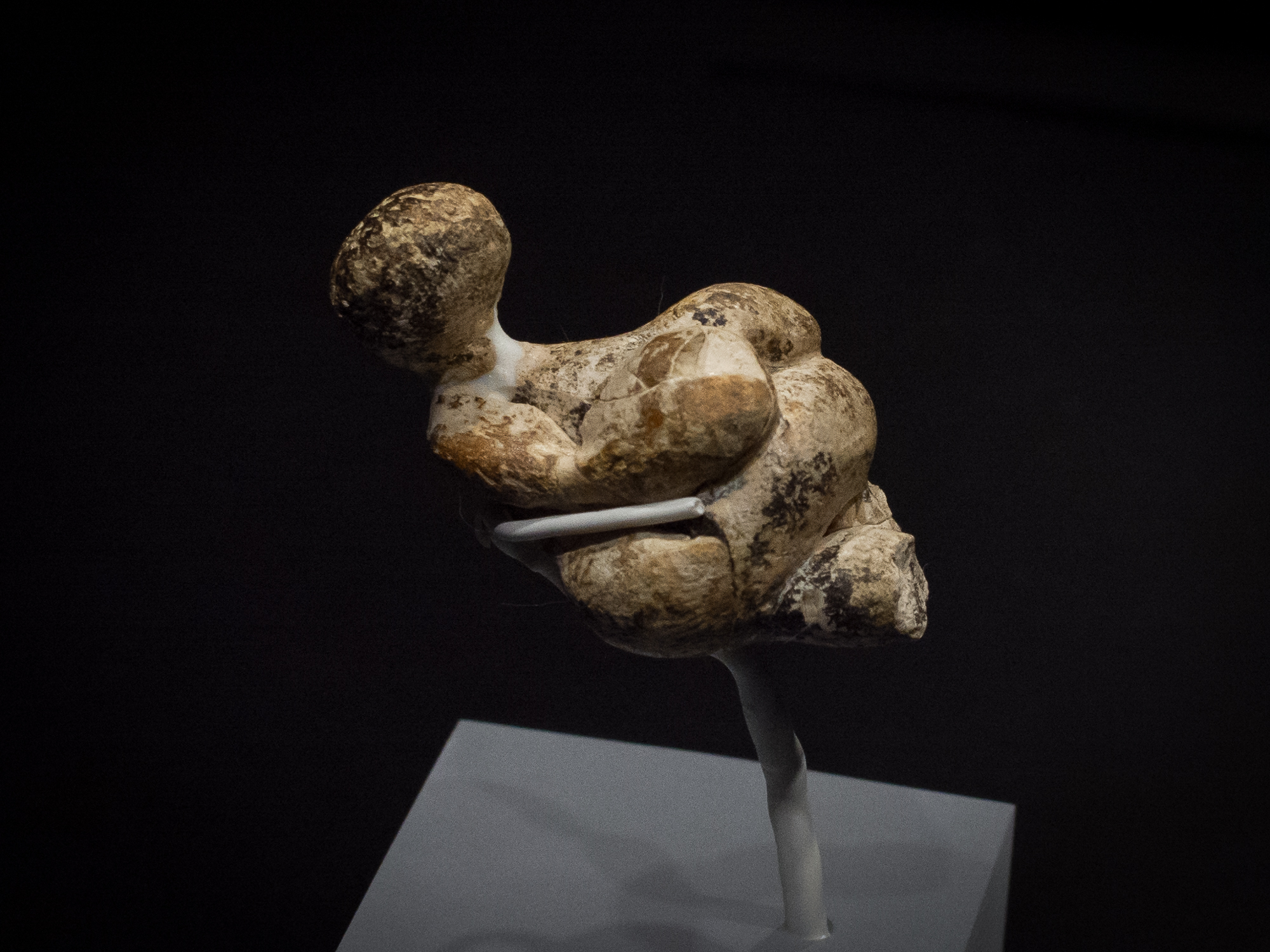 Frauenstatuette von Gagarino, Mammutelfenbein, Höhe: 56 mm, Gravettien ca. 23.000 BP, Original, ausgestellt im Archäologischen Museum Hamburg (Eiszeiten - Die Kunst der Mammutjäger vom 18. Oktober 2016 bis 14. Mai 2017). Aufbewahrungsort sonst Kunstkammer Sankt Petersburg, Russland.